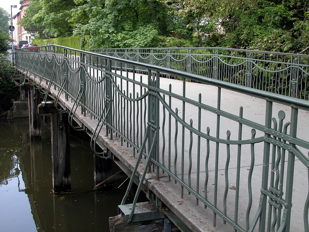 Braunschweig: Sidonienbrücke von Osten gesehen.